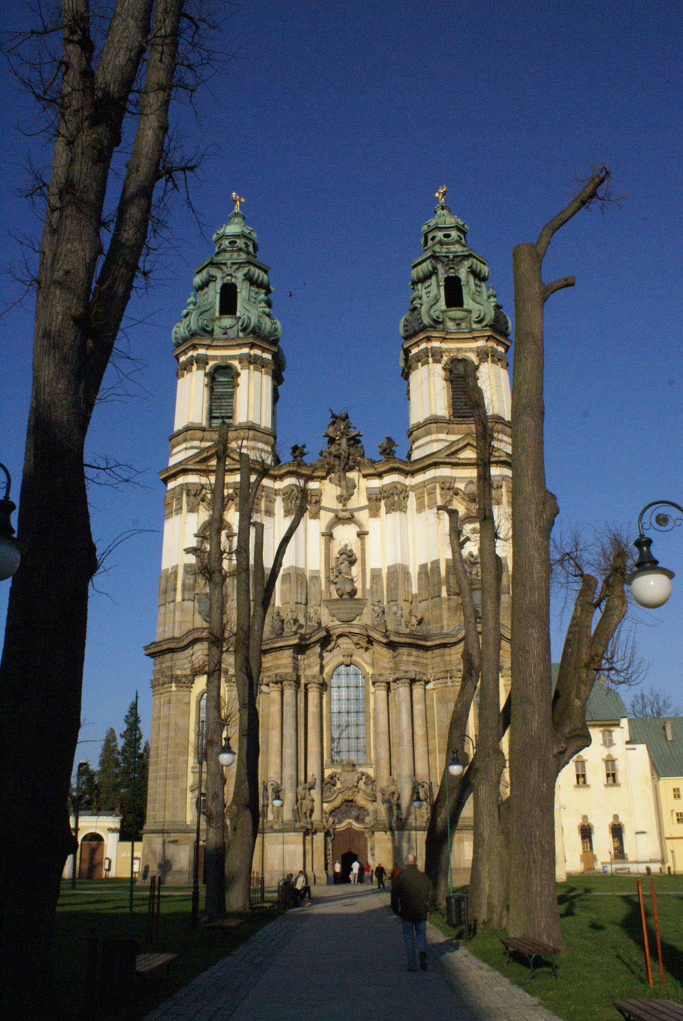 Krzeszów, kościół, ob. par. p.w. Wniebowzięcia NMP, 1728-1735